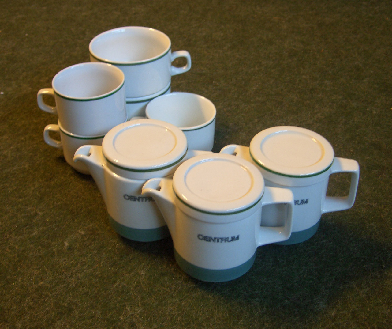 "rationell". Design: Margarethe Jahny für Colditz Porzellan